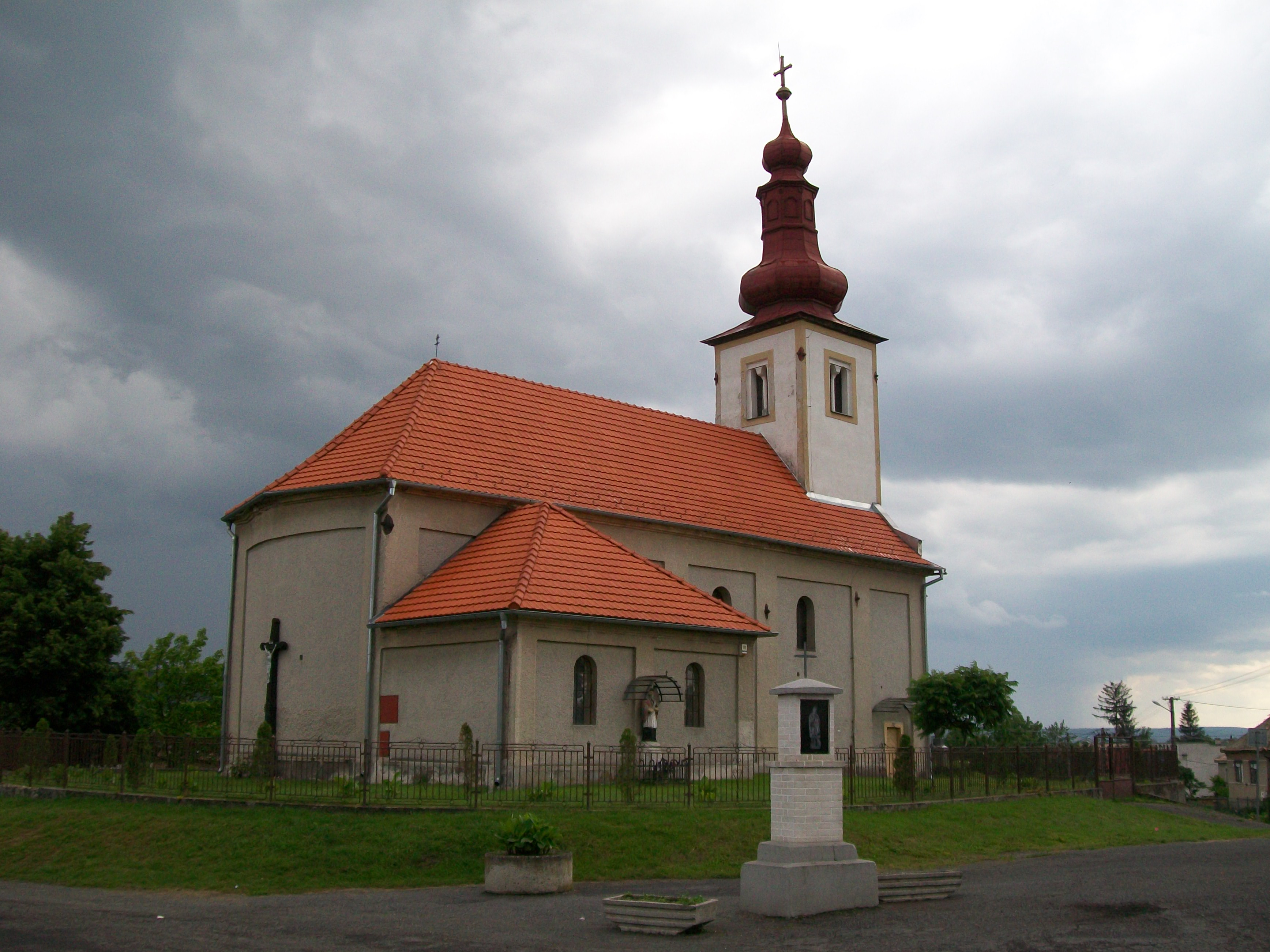 Rímskokatolícky kostol sv. Gallusa vo Veľkých Dravciach, postavený bol na začiatku 18. storočia, prestavaný a rozšírený v roku 1909 a opravovaný v roku 1958